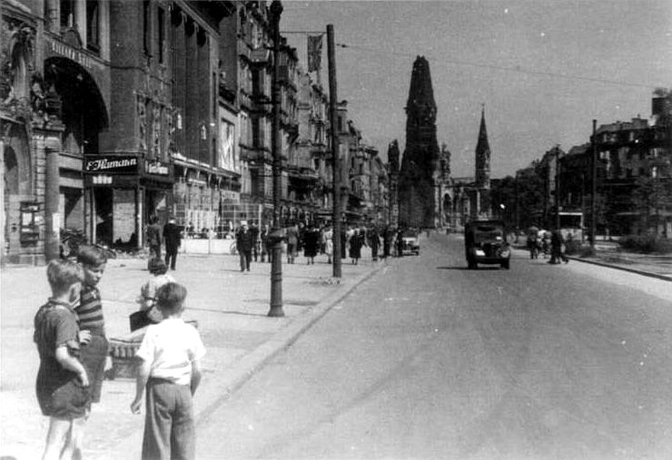 Berlin, Kudamm, Kaiser-Wilhelm-Gedächtnis Kirche Berlin, Kurfürstendamm.- Blick auf die Kaiser-Wilhelm-Gedächtnis Kirche; ca. Juli/August 1945